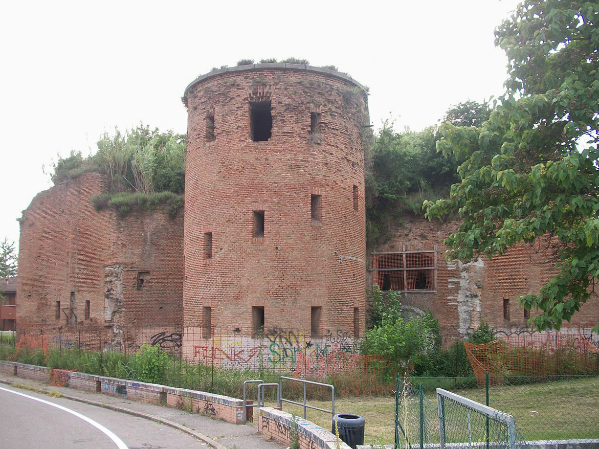 Forte San Zeno - Radetzky - Verona